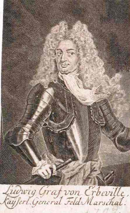 Ludwig von Herbeville (1639-1709)